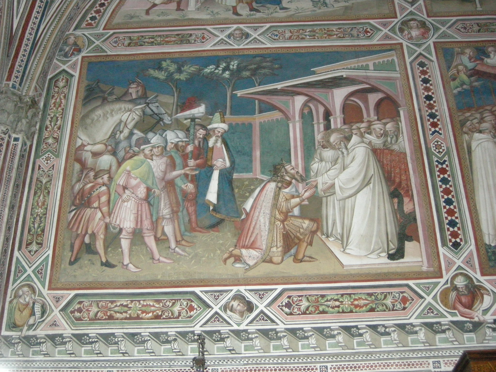 Spinello Aretino, Storie di san Benedetto, episodio 15 - Totila si inginocchia davanti a san Benedetto